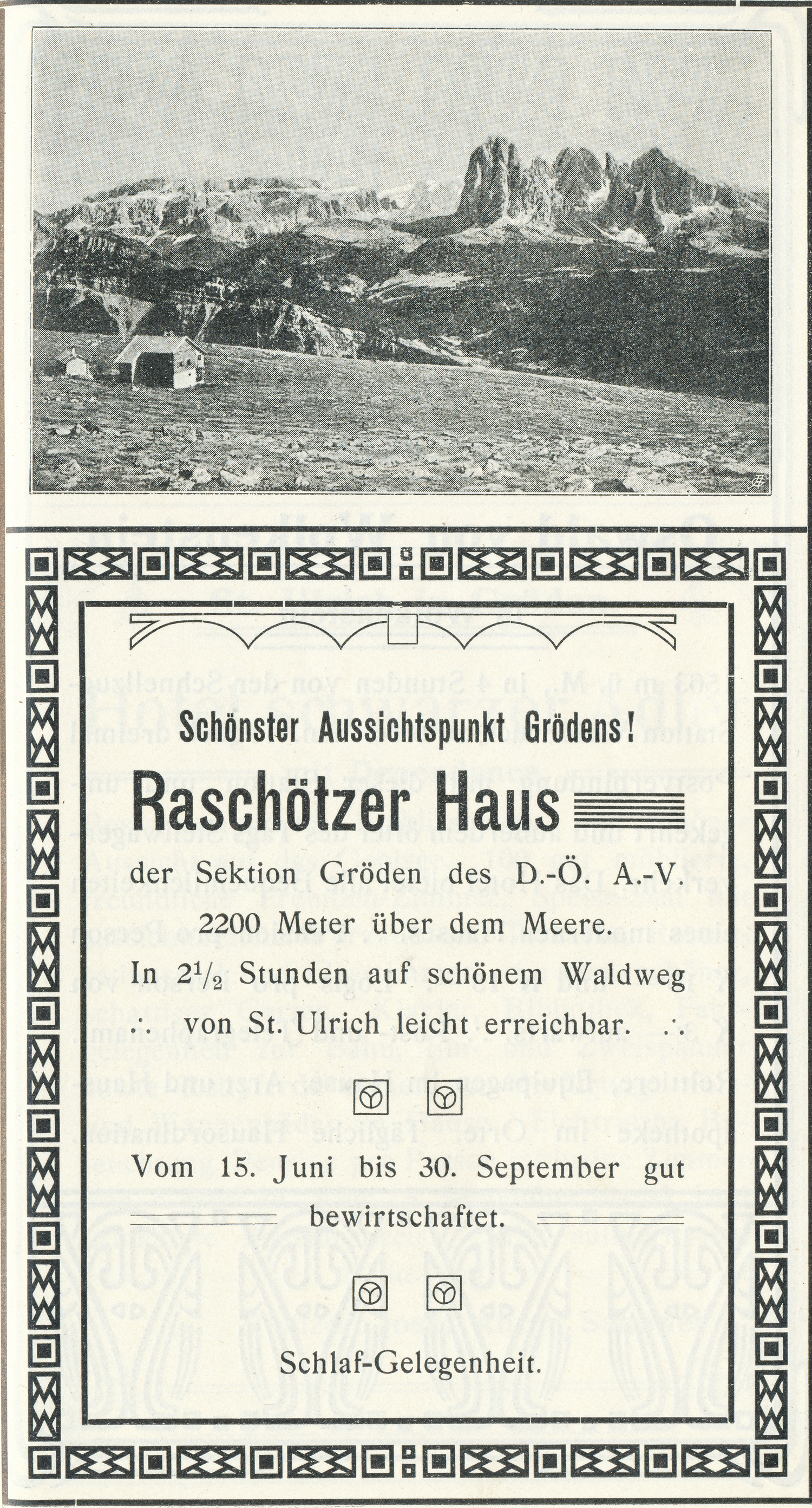 Raschötzer Hütte über St. Ulrich in Gröden 1911. Reklame aus dem Kalënder de Gherdëina, Jahrgang 1911